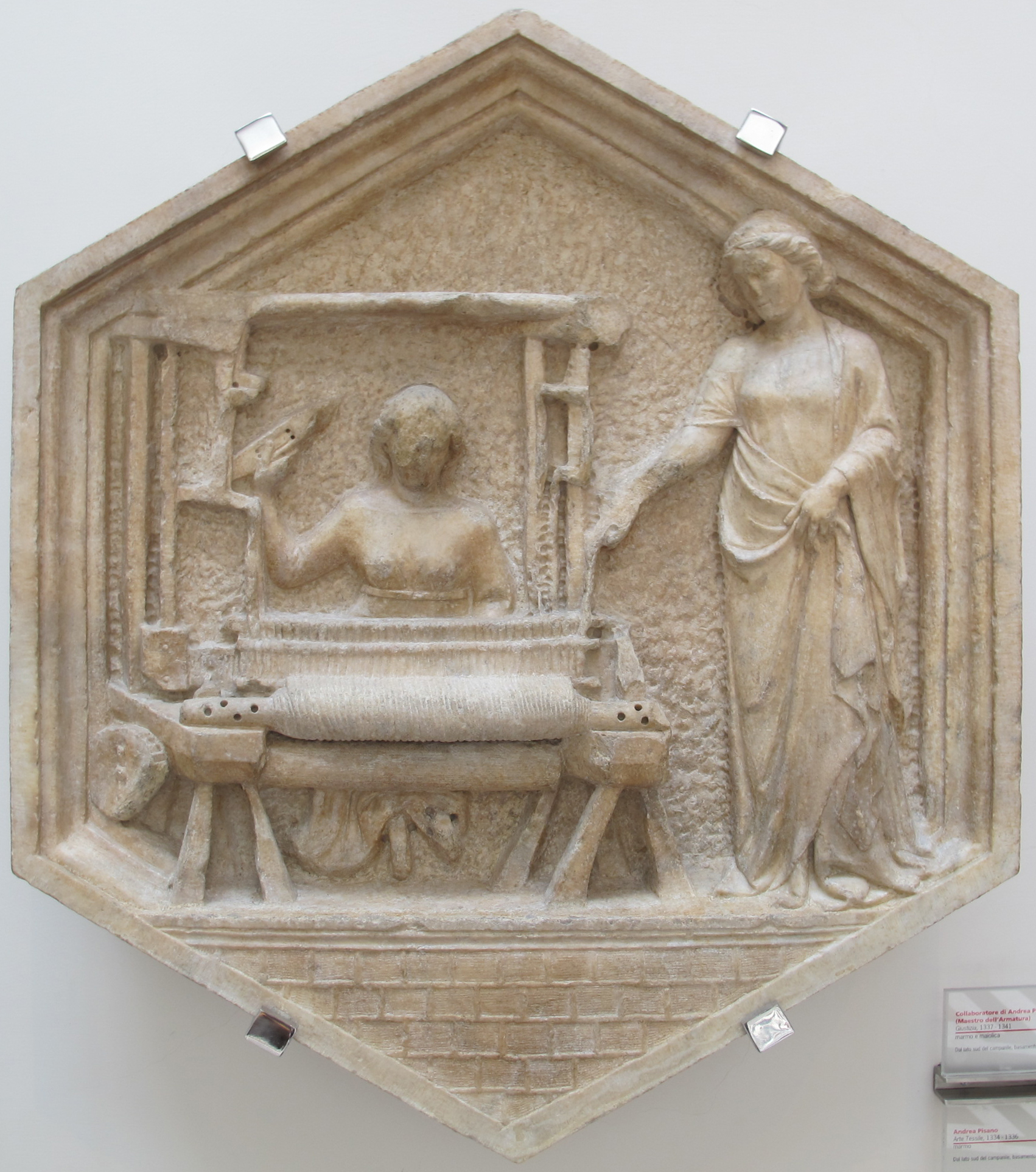 Andrea pisano, arte tessile, 1334-36